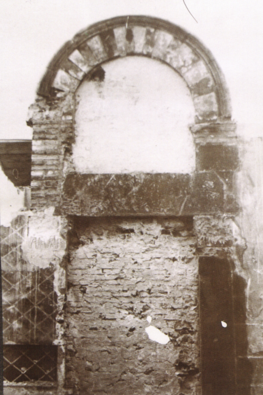 San matteo, pistoia, foto 3 del 1898